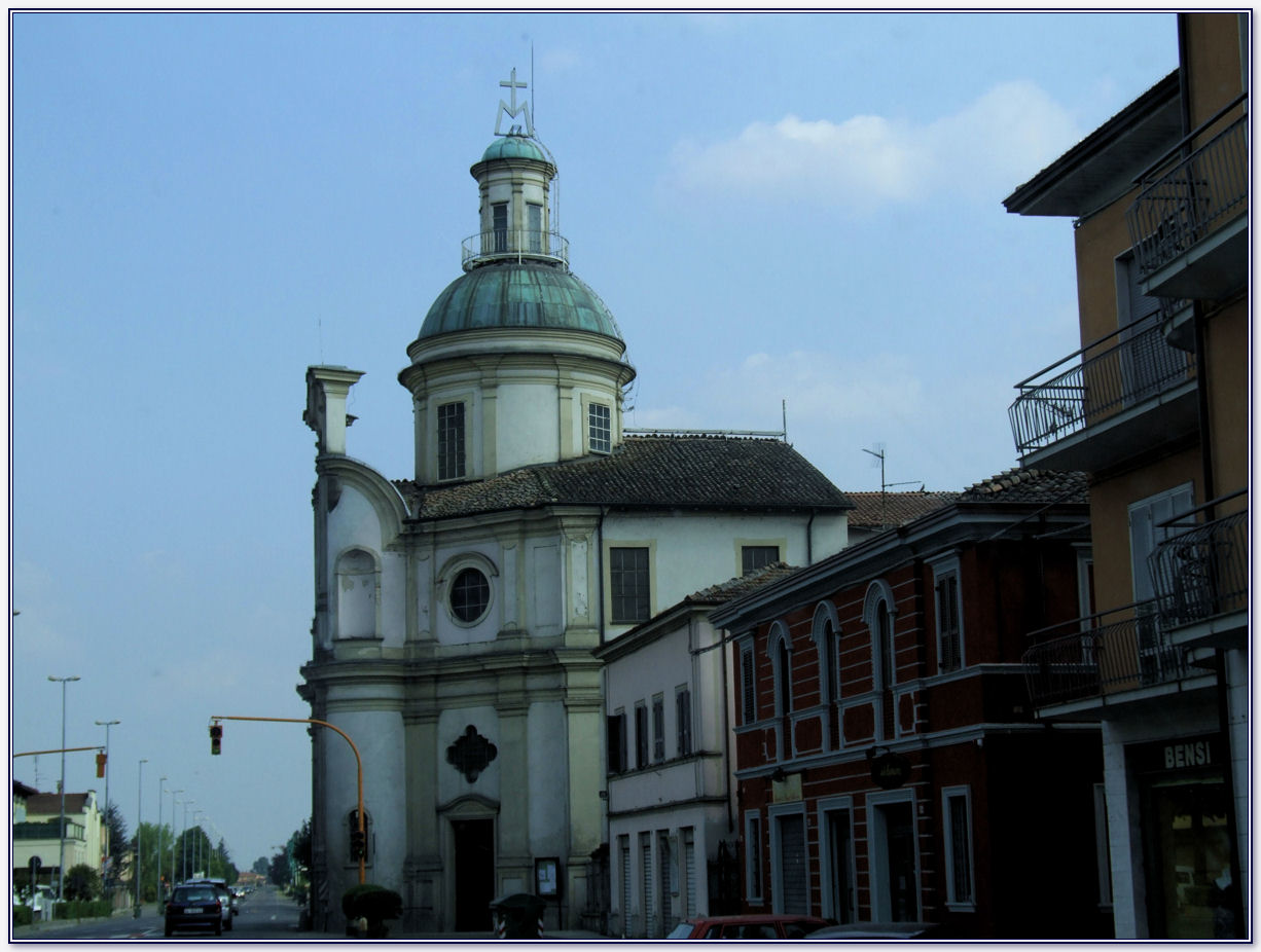 Santuario Roveleto di Cadeo, Cadeo, Italy (Emilia-Romagna) (Prima della Ristrutturazione 2009)